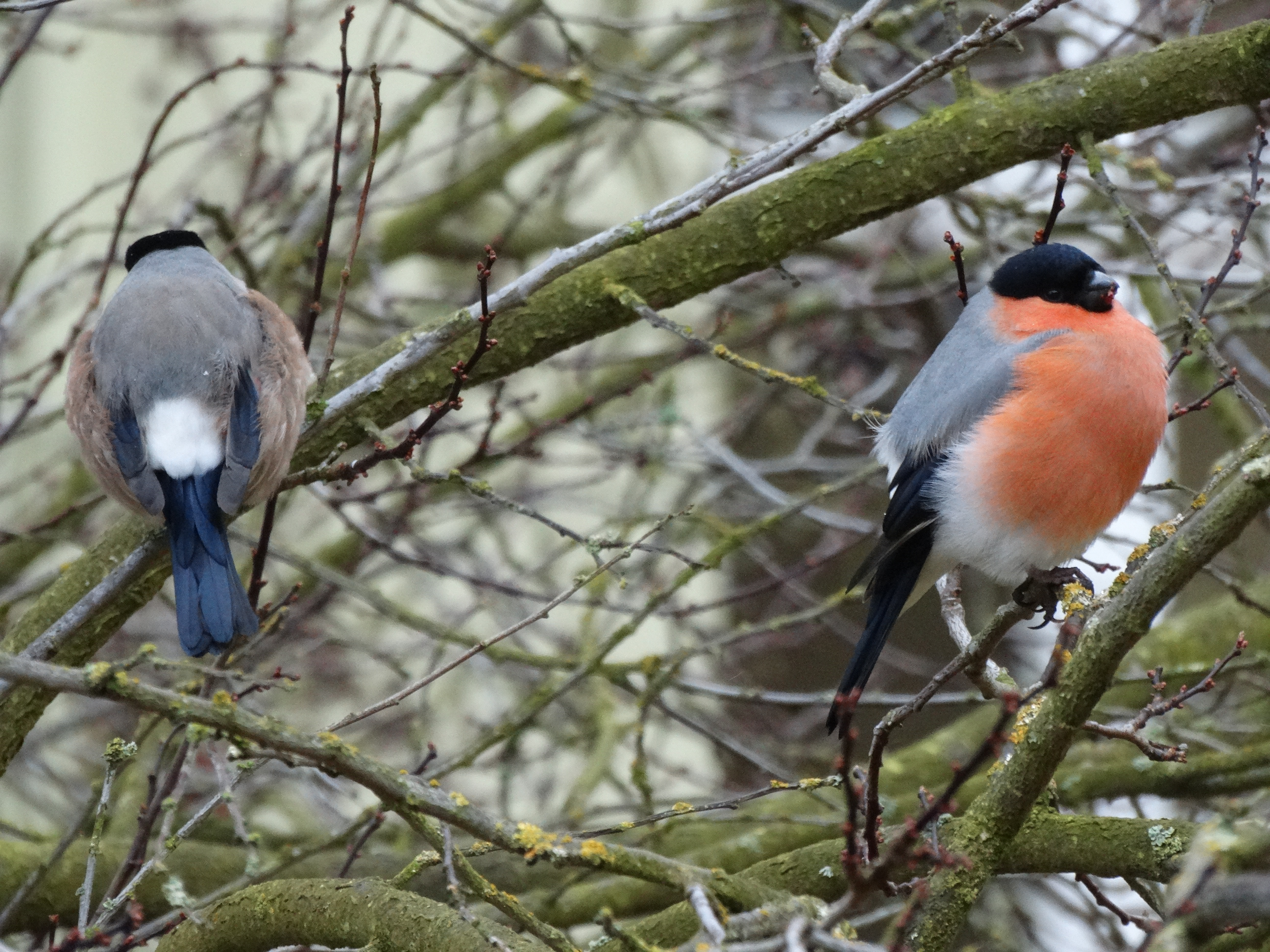 Dompfaffenpaar, Bayern im Winter 2015